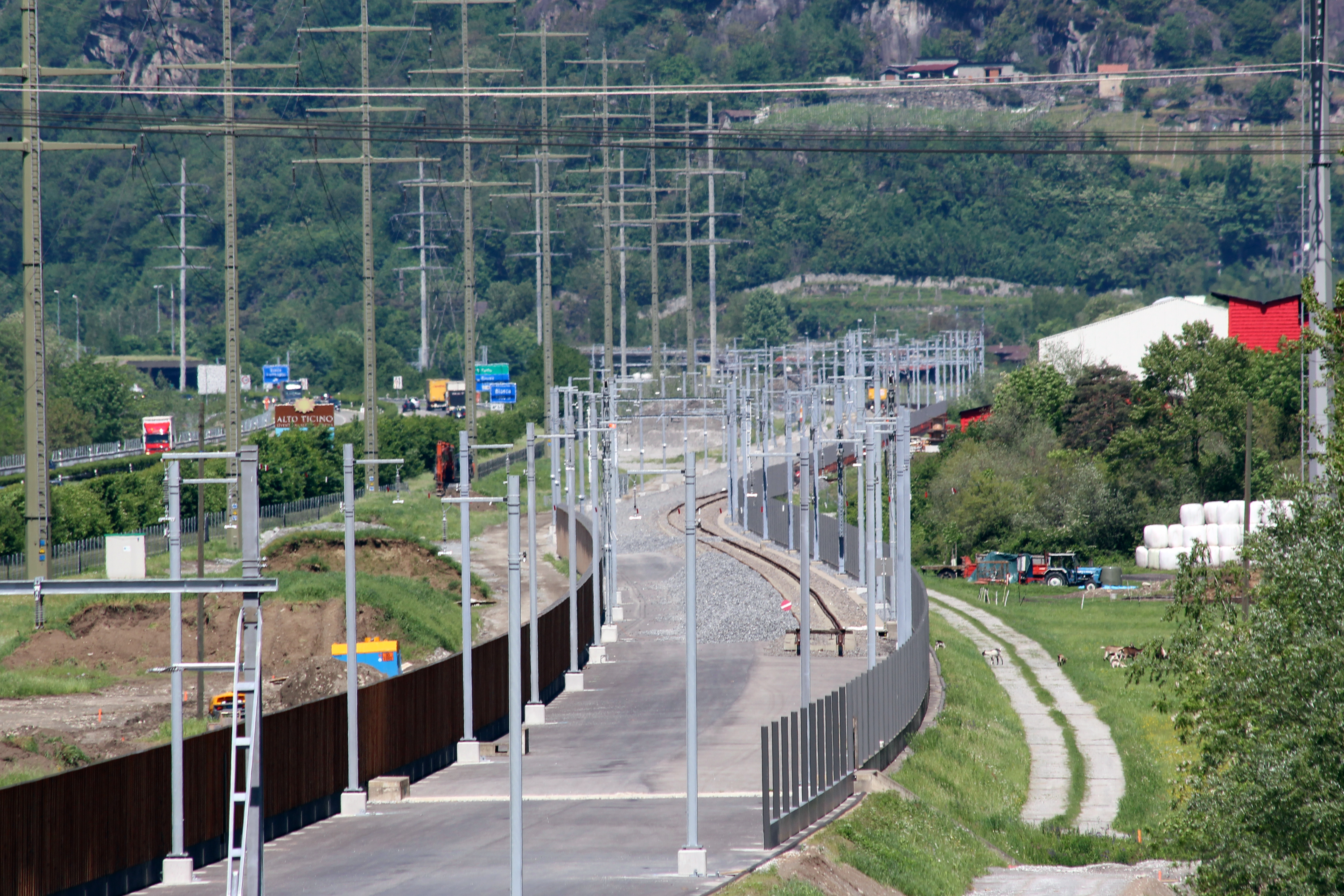 AlpTransit NEAT - Baustelle Biasca TI